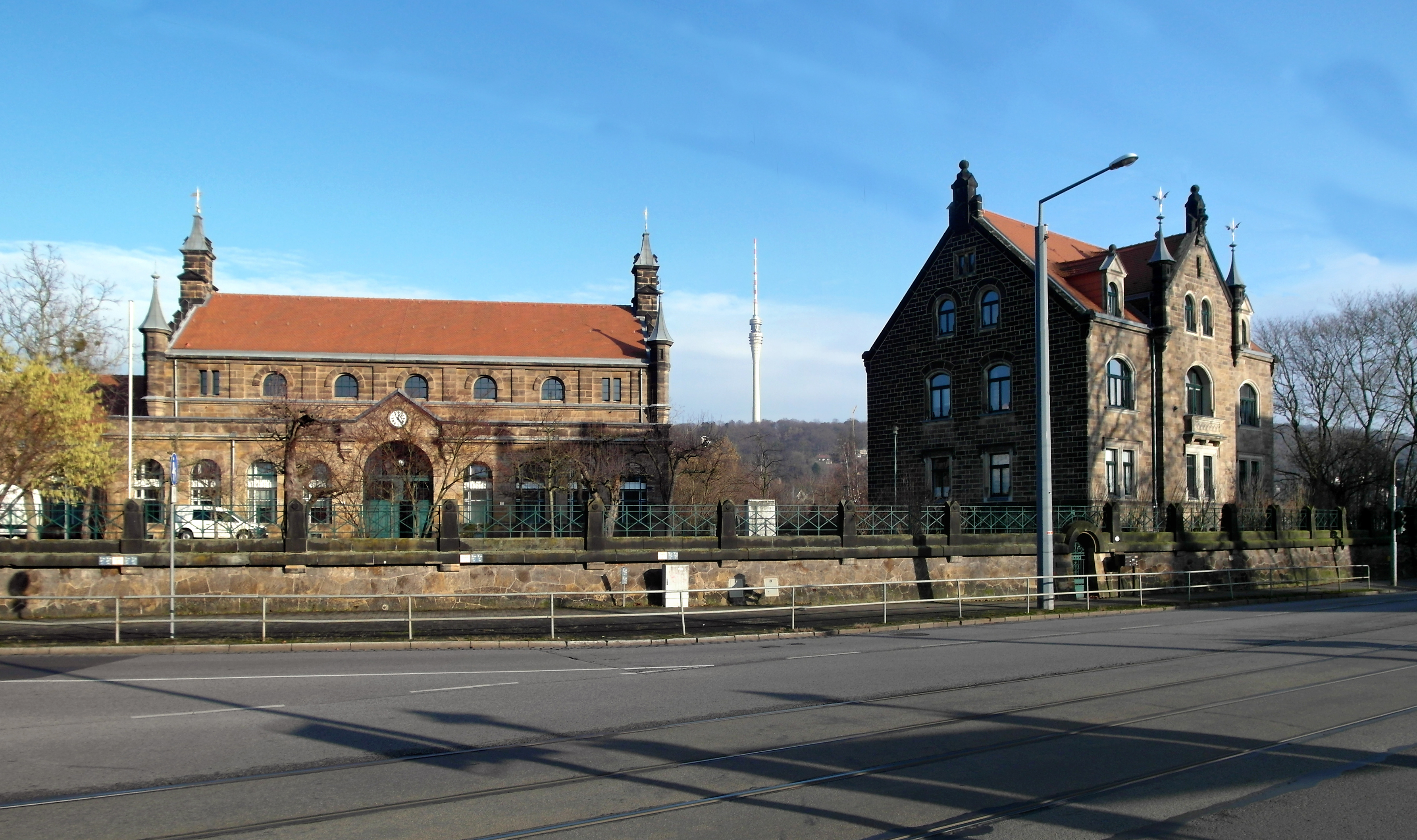 11.01.2018 01279 Dresden-Tolkewitz, Wehlener Straße 37 (GMP: 51.034439,13.824093): Wasserwerk Tolkewitz, erbaut 1896-1898. Sicht von Süden. [SAM3494.JPG]20180111260DR.JPG(c)Blobelt